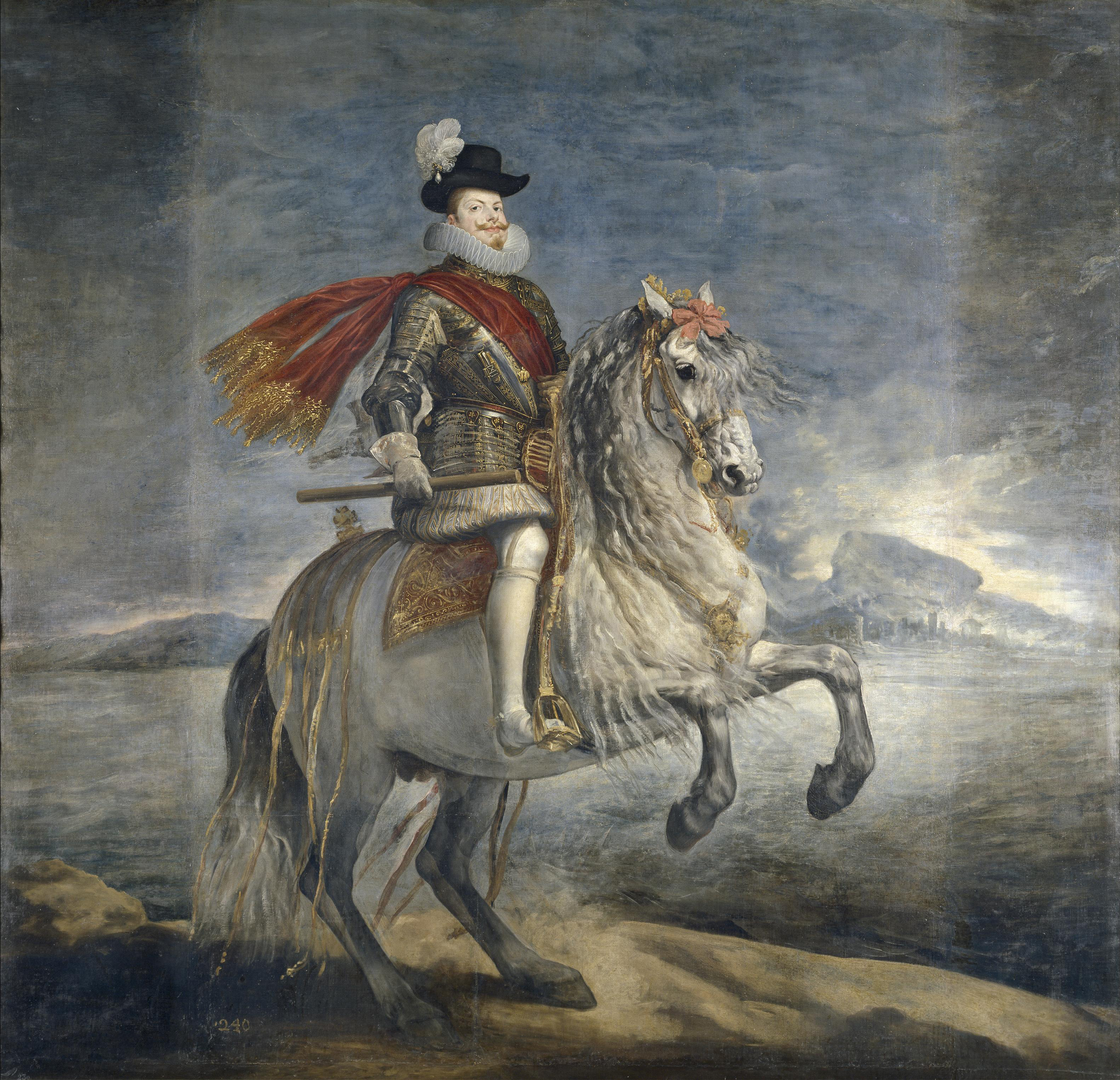 Retrato ecuestre del rey Felipe III de España (1578-1621), que fue hijo del rey Felipe II de España y de la reina Ana de Austria.